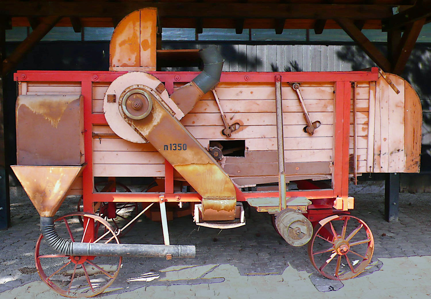 Dreschmaschine (n 1350) in Offenburg-Elgersweier, Baden-Württemberg, Deutschland